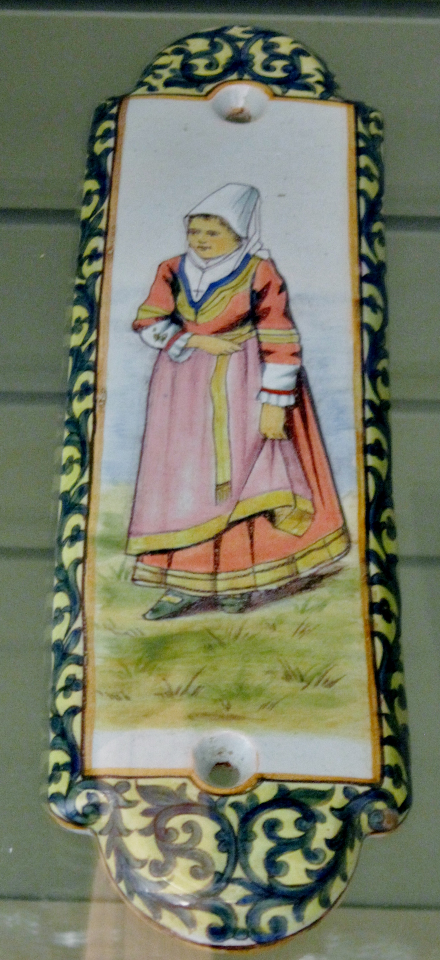 Plaque de propreté représentant une femme de Ploaré (faïence Porquier-Beau, fin XIXe siècle, musée départemental breton).